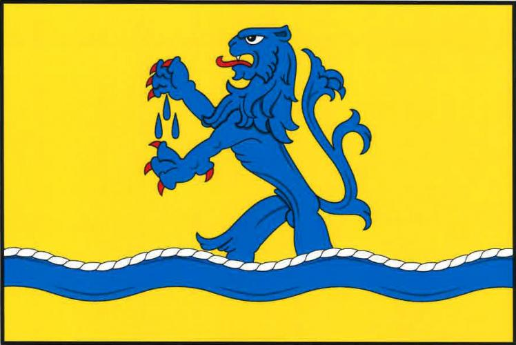 vlajka, Prodašice, okres Mladá Boleslav